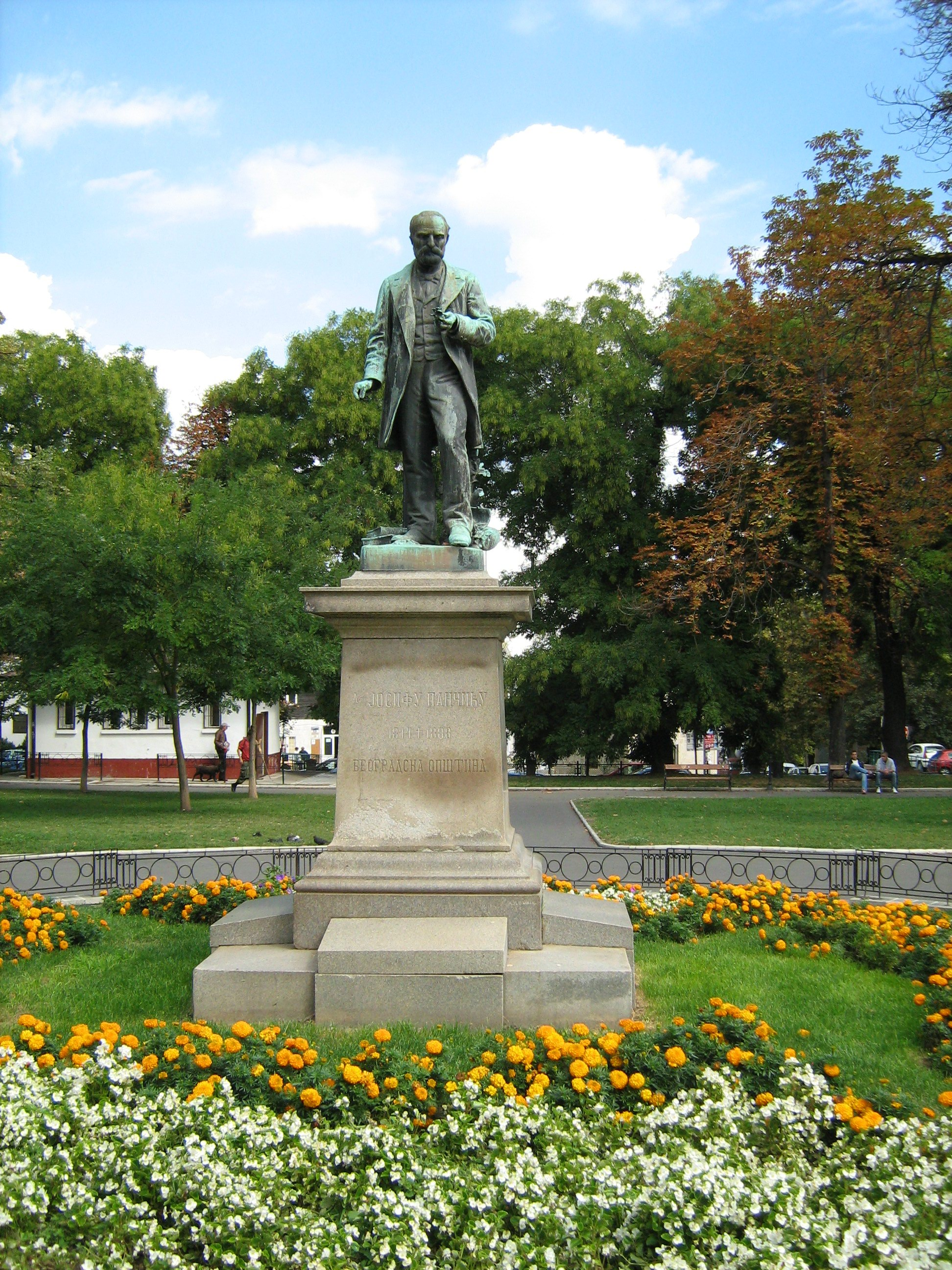 Споменик Јосифу Панчићу, Београд